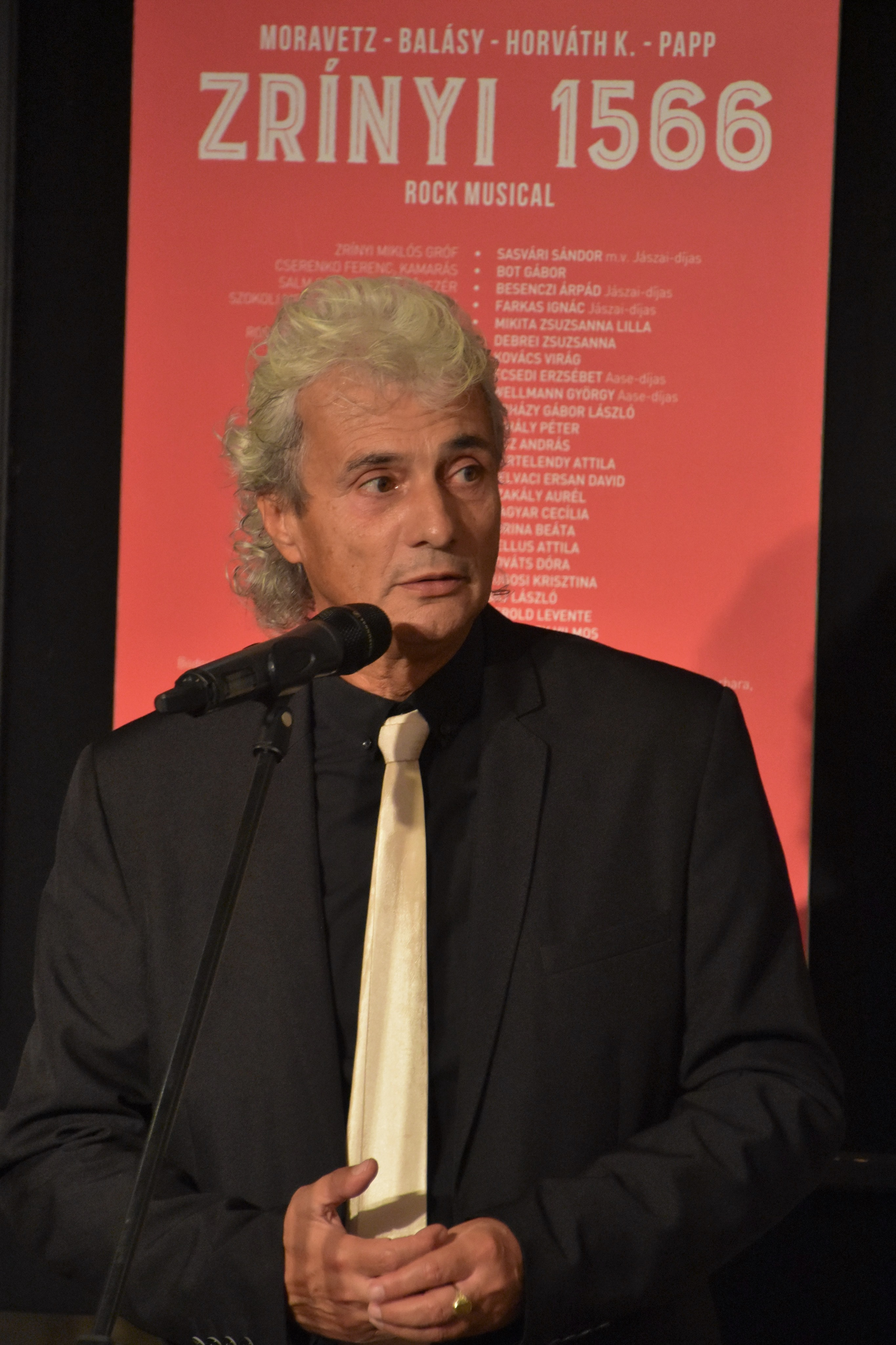 Zrínyi1566 – Moravetz Levente író, rendező (Zalaegerszeg)